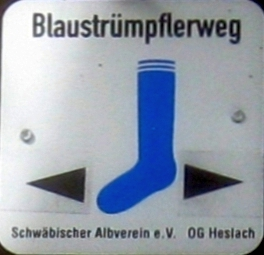 Wegzeichen des Blaustrümpflerwegs (Rundwanderweg) in Stuttgart.